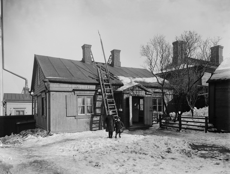 Kristianinkatu 12 pihan puolelta vuonna 1907. Vasemmalla Martta Bröyer (Nevalainen)